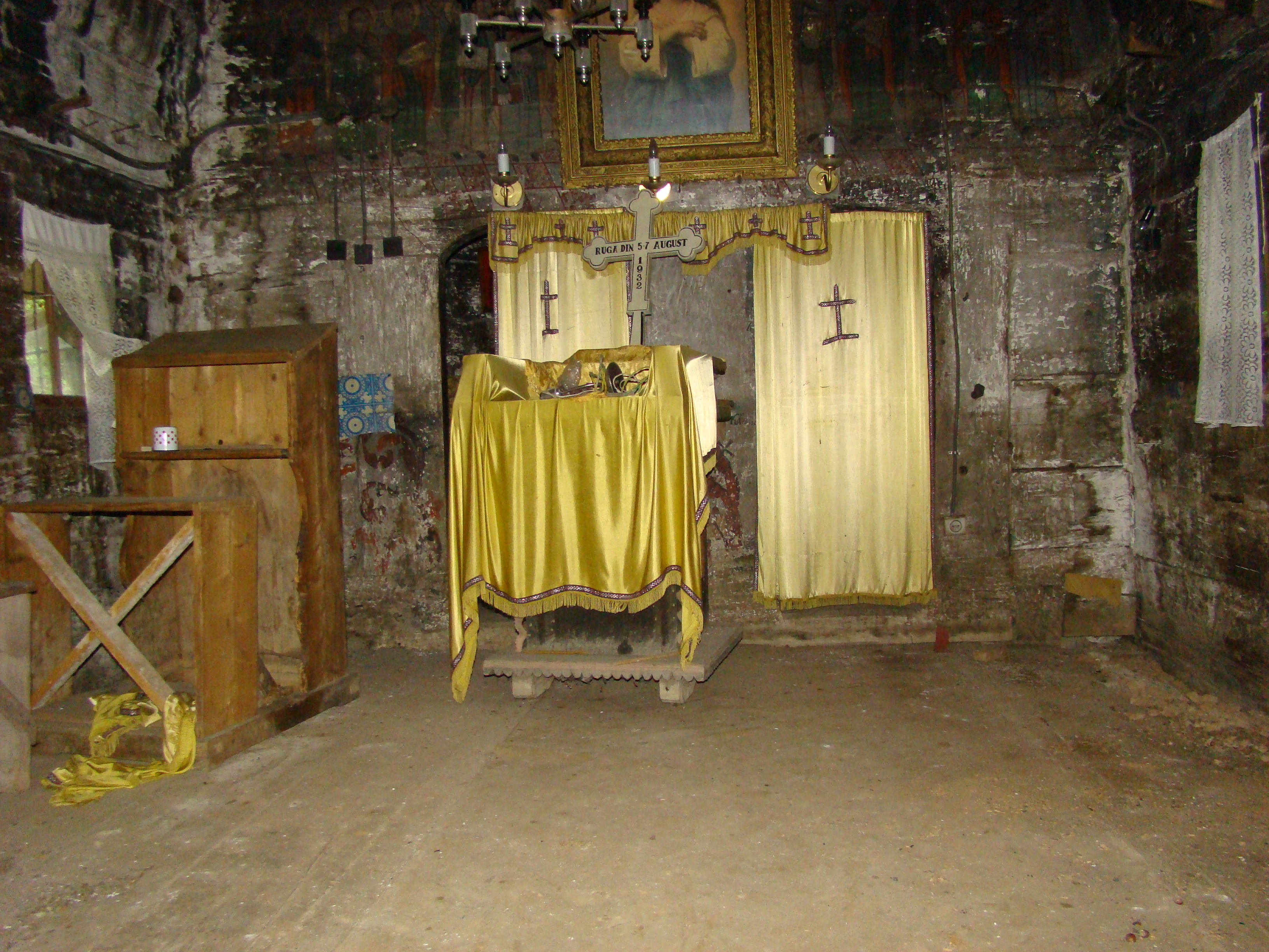 Biserica Sfinţii Arhangheli, Sat Brusturi, Comuna Creaca, județul Sălaj